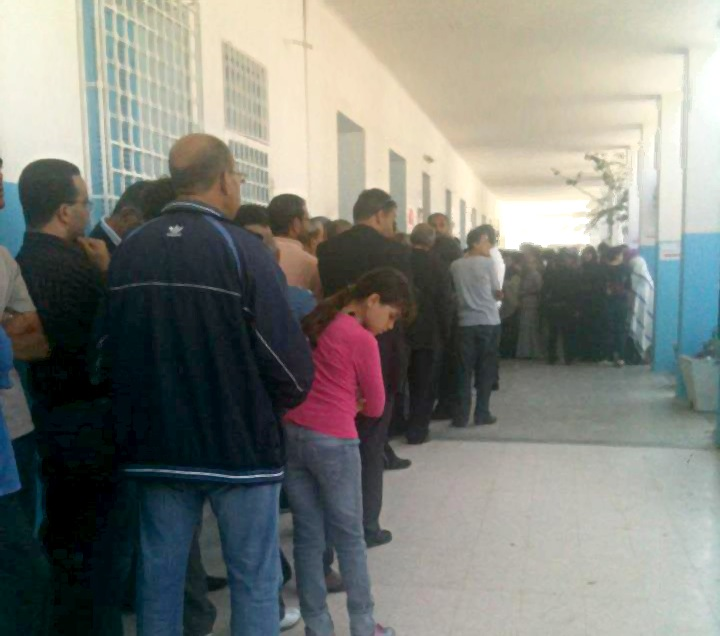 Files d'attentes séparées entre hommes et femmes lors des élections de l'Assemblée nationale constituante en Tunisie le 23 octobre 2011. Bureau de l'école la République, Sayada.